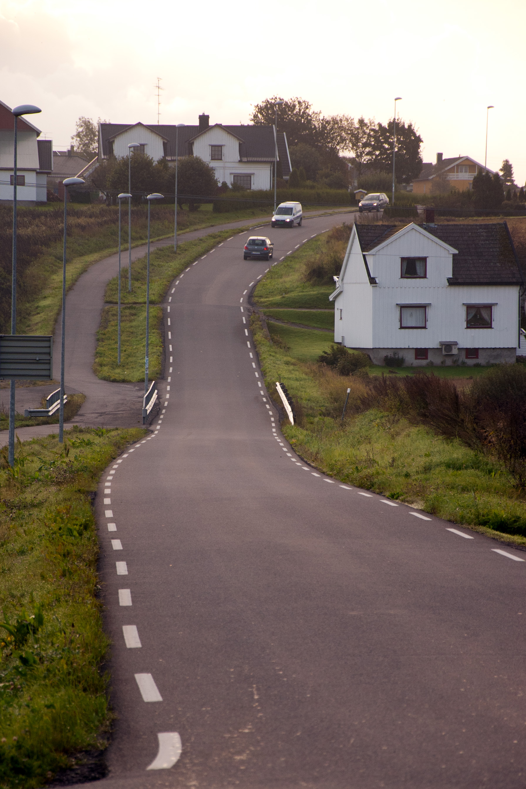 Fylkesvei 536 Basbergveien i Tønsberg, Vestfold